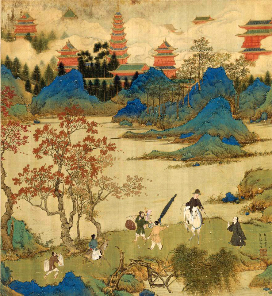 鹿鳴徹歌，時年三十一